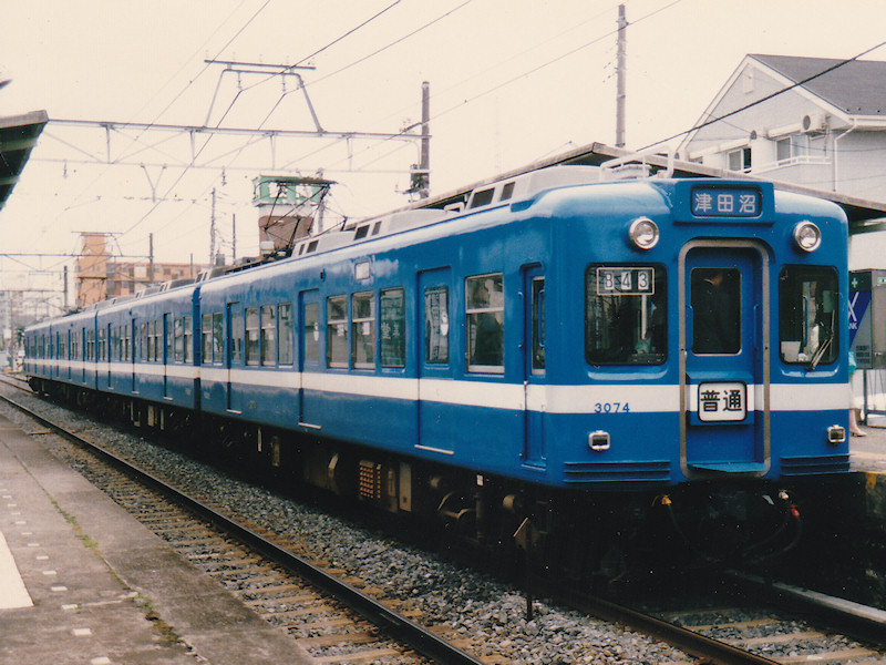 千葉急行3050形電車（3074編成）撮影：検見川駅